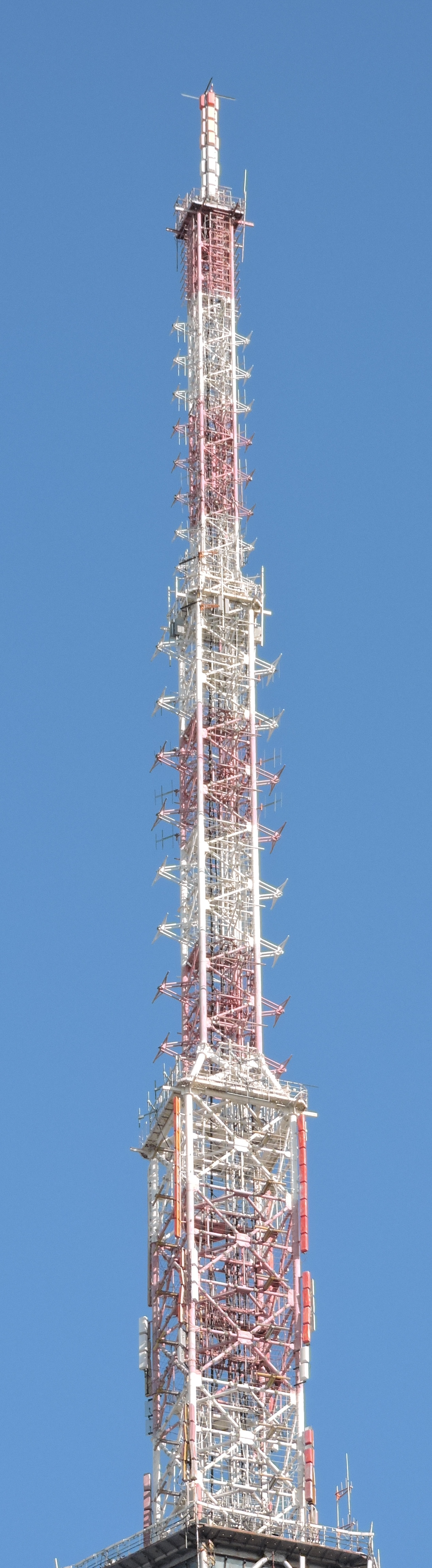 Шпиль питерской телебашни